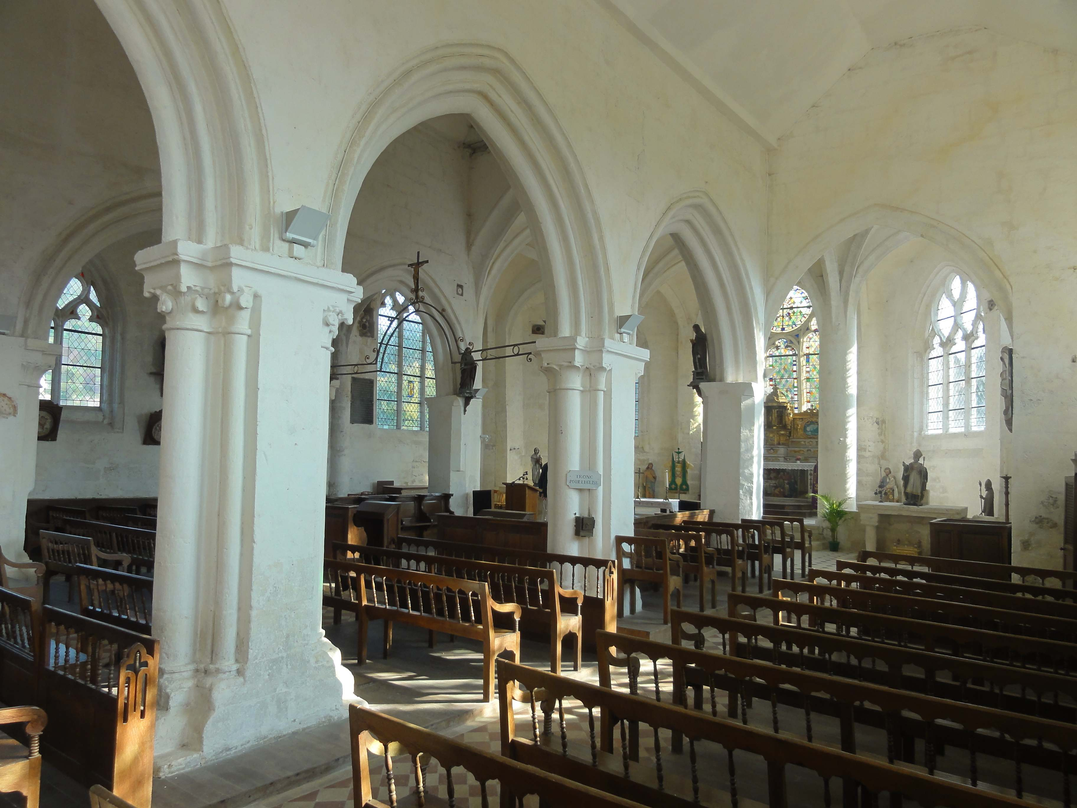 Intérieur de l'église - voir titre.